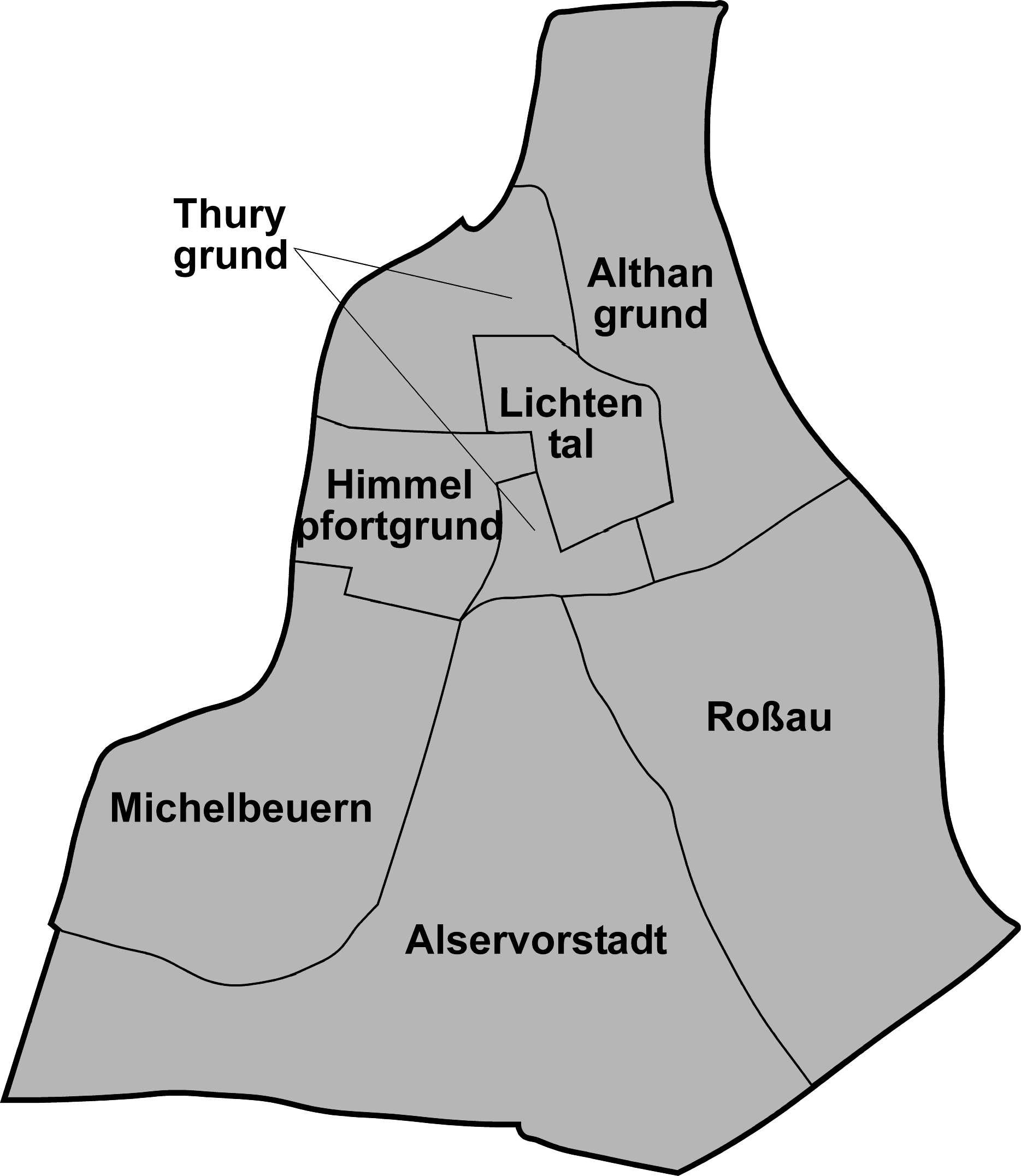 Map of Alsergrund